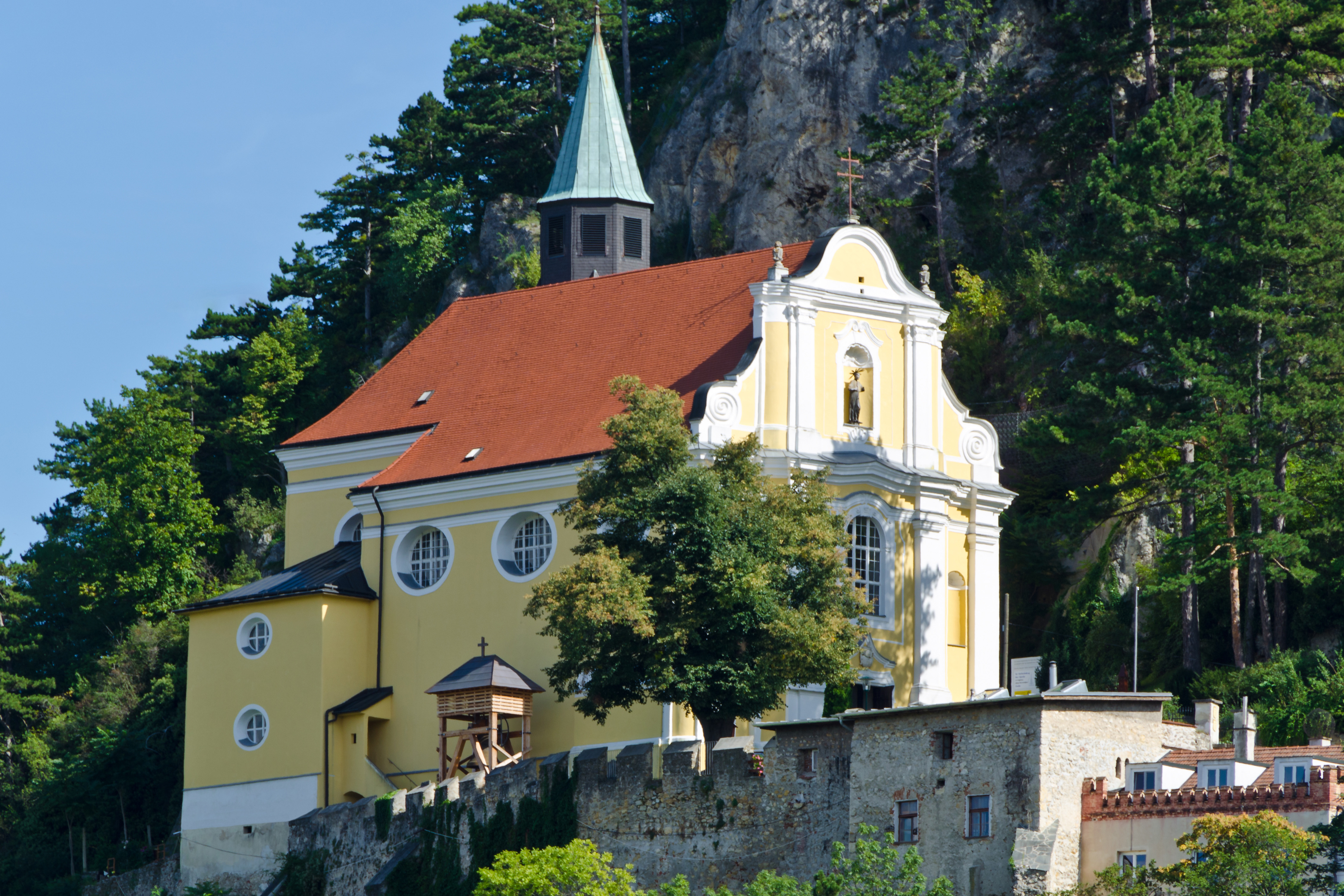 Kath. Pfarrkirche (Bergkirche) hl. Georg, Felsenkapelle und Wehrmauern